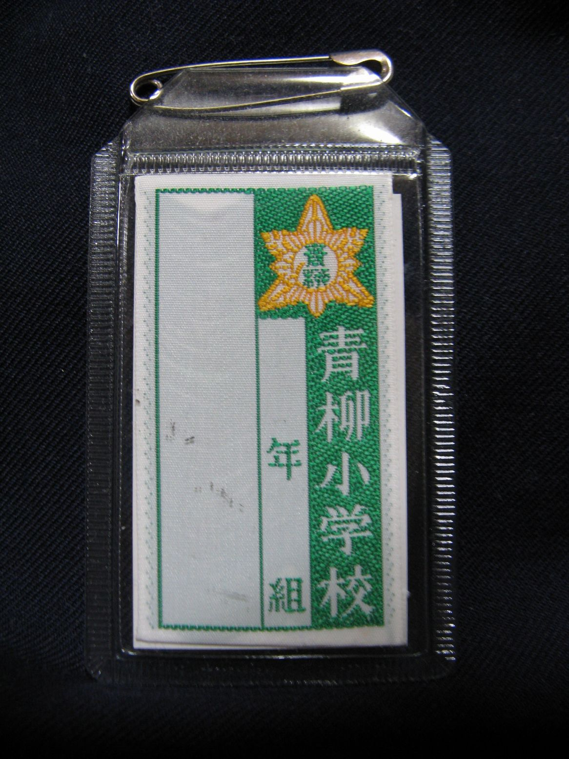 日本における小学校の名札の一例。ビニールケースに布製の記入部を挿入したもの。千代田ネーム工芸社製（未使用品）。